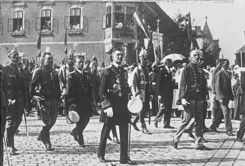 Der grosse St. Stephanstag in Budapest! Die grösste Nationalfeier Ungarns zu Ehren St. Stephans, des ersten Königs von Ungarn, wurde in Budapest unter Beteiligung des Reichsverwesers Horty, der Kirchen, weltlichen und militärischen Behörden festlich begangen. Der ungarische Reichsverweser Horty (X) im Prozessionszuge.